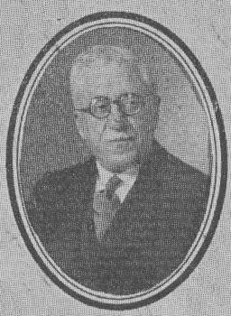 حسینقلی نواب وزیر امور خارجهٔ ایران در سالمندی